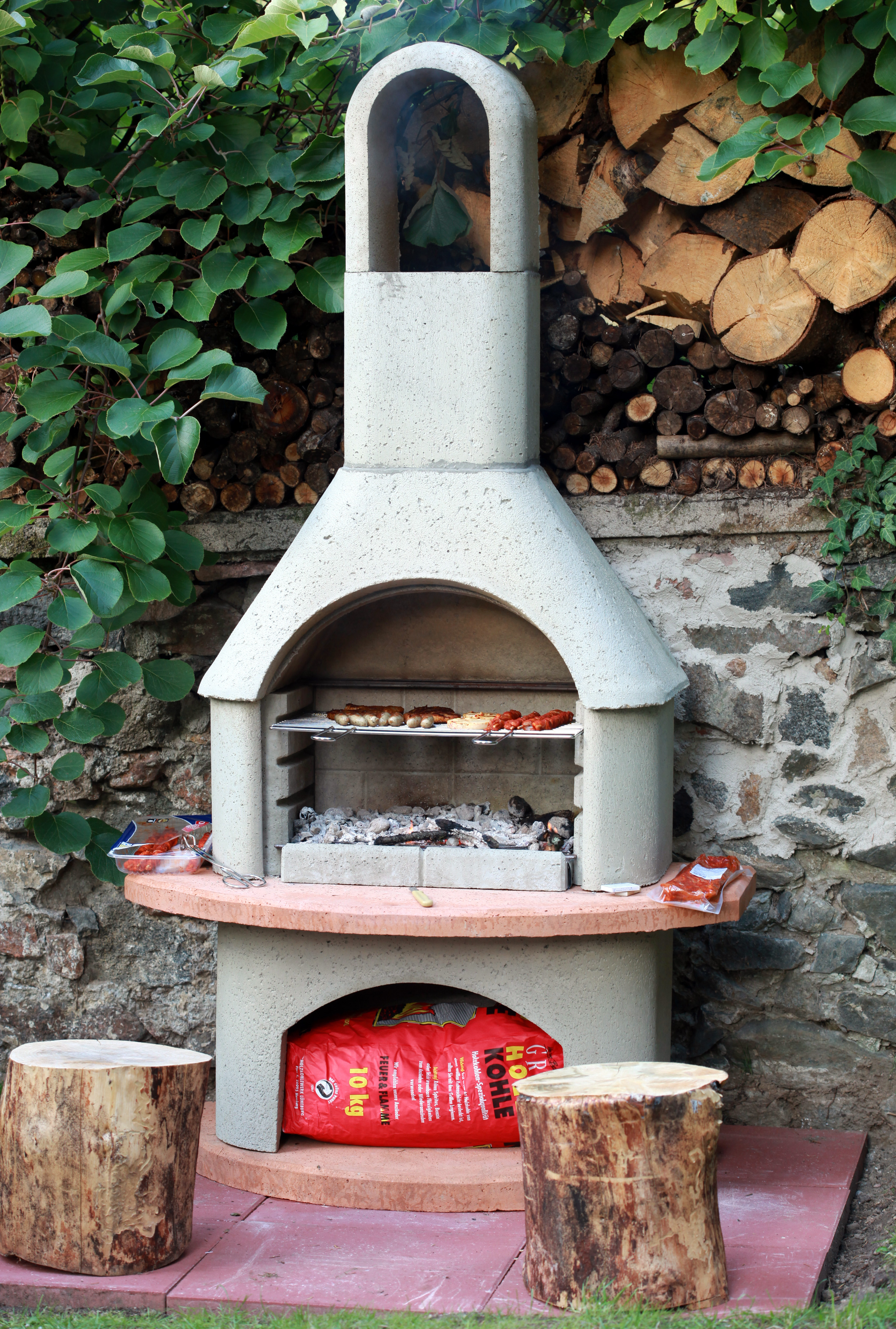 Ein Grillkamin aus Beton-Fertigteilen.